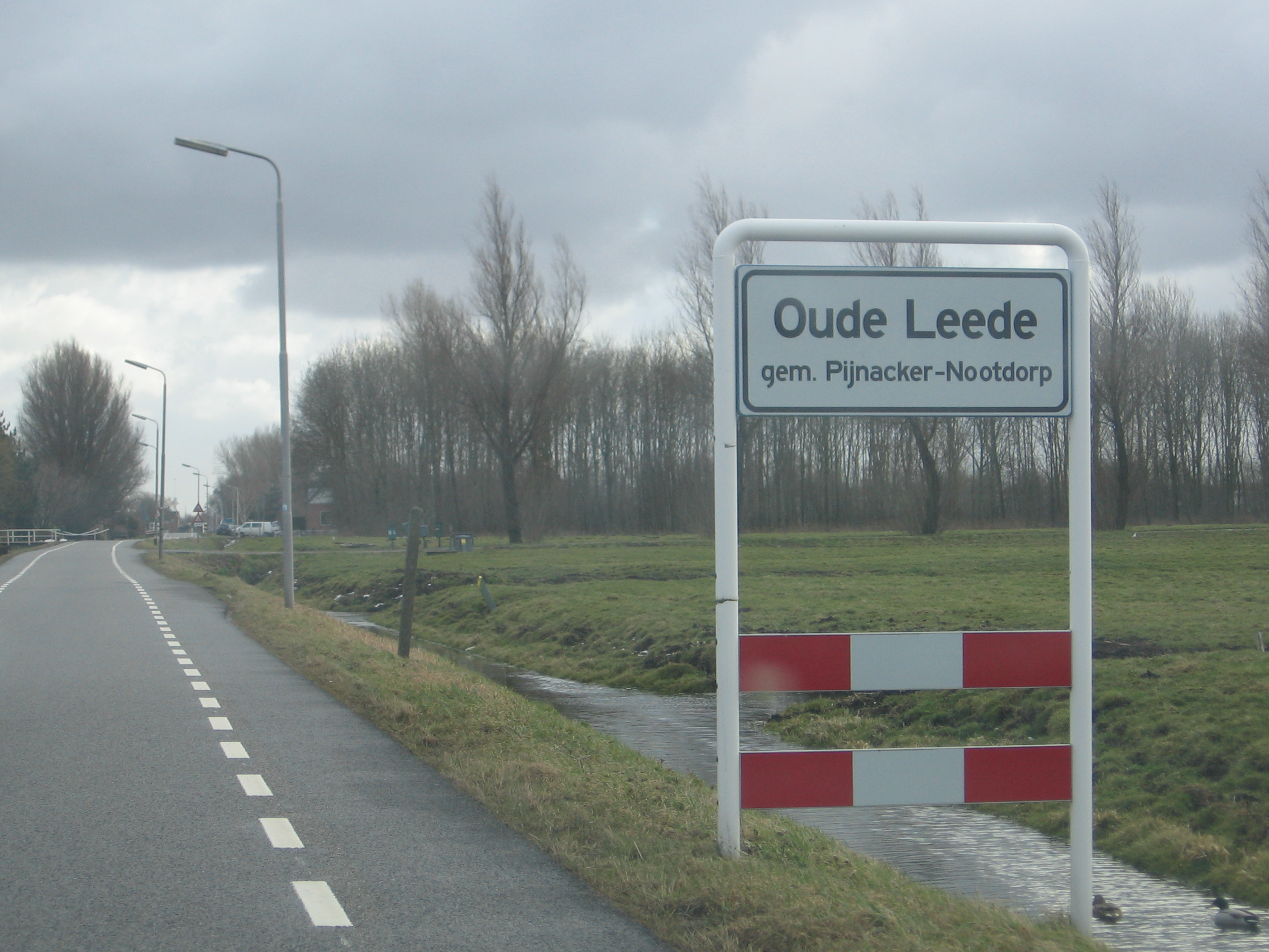 Oude Leede, maart 2006